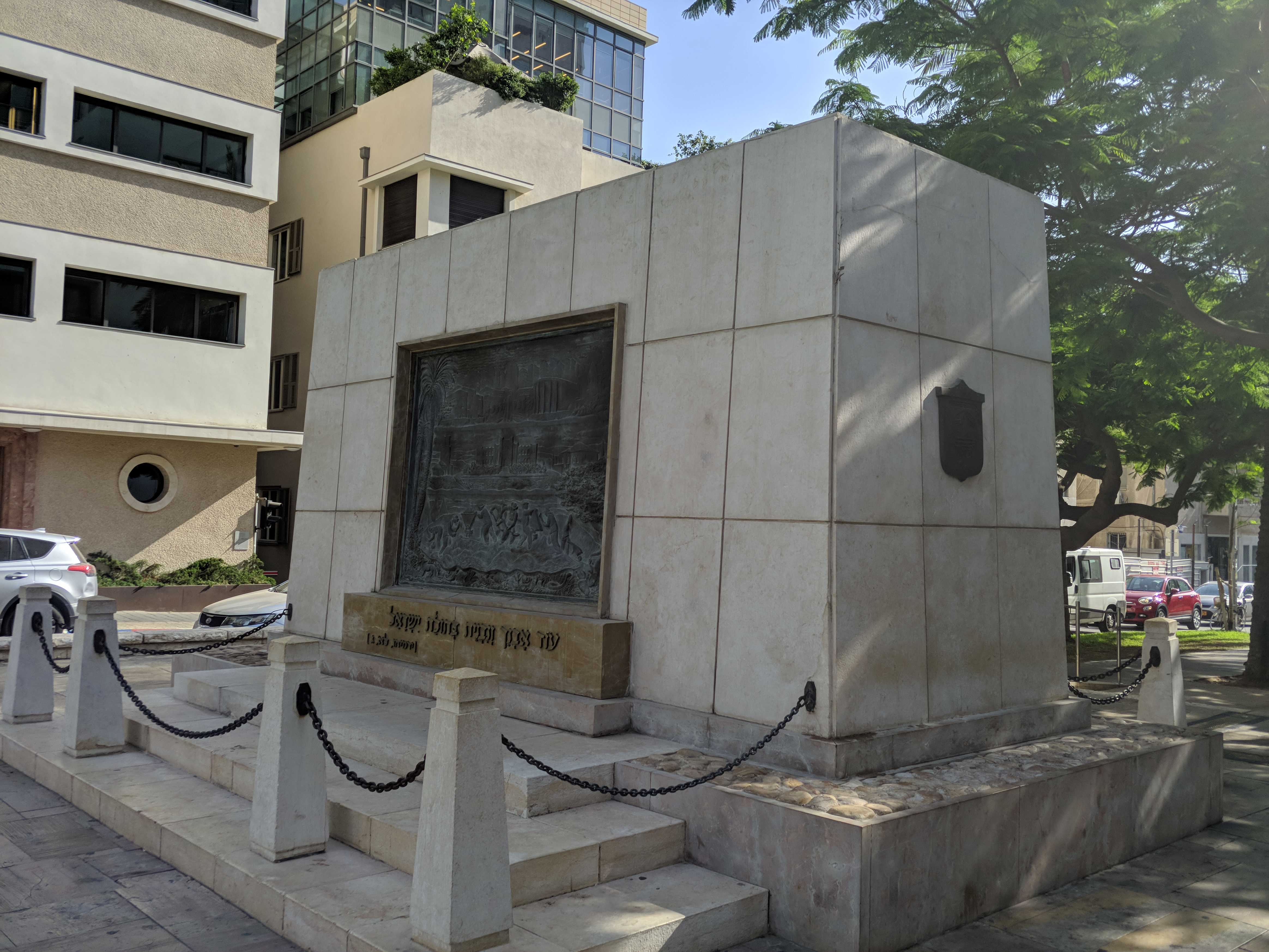 Das Gründer Denkmal (1949) von Tel Aviv auf der Sderot Rothschild Straße, im Blick aus Osten.